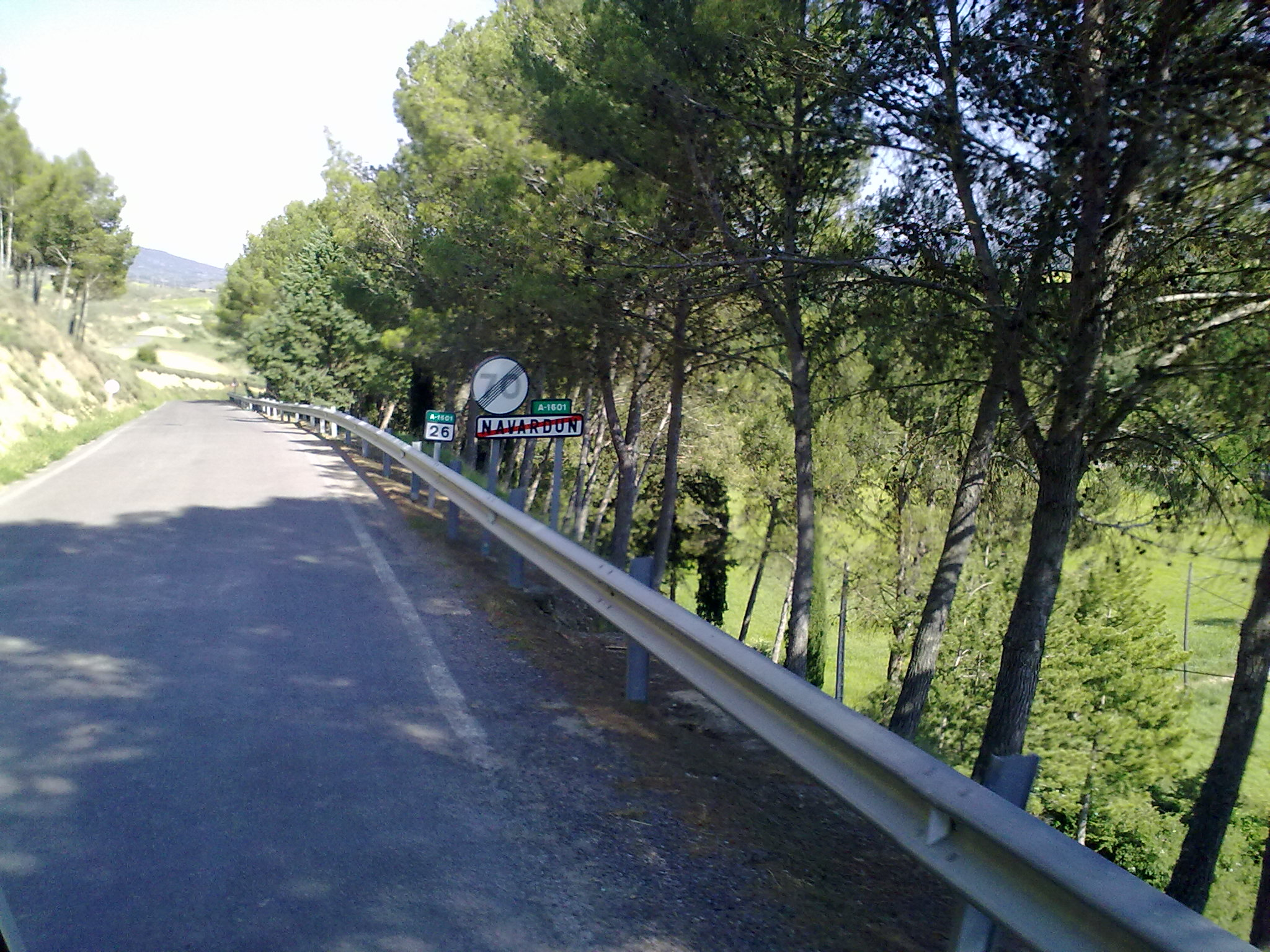 Navardún le 23 mai 2010. Espagne.